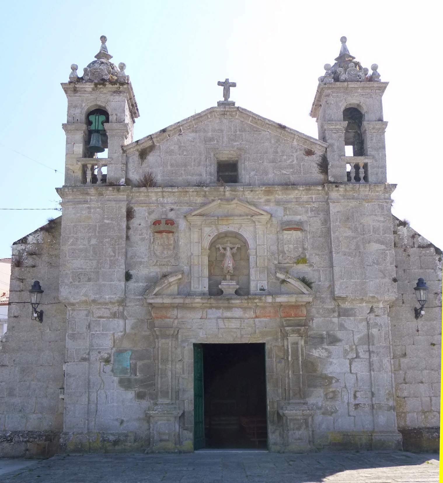 Baiona - Capela de Santa Liberata